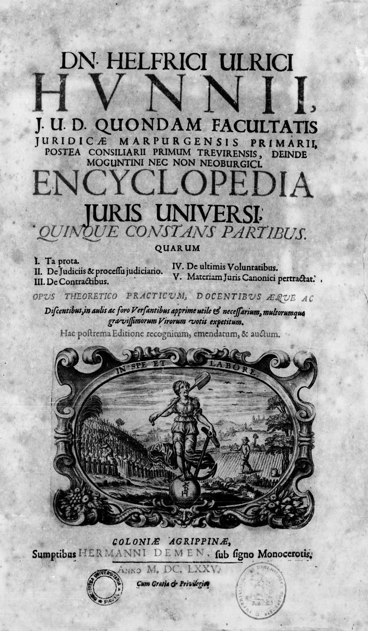 Frontespizio